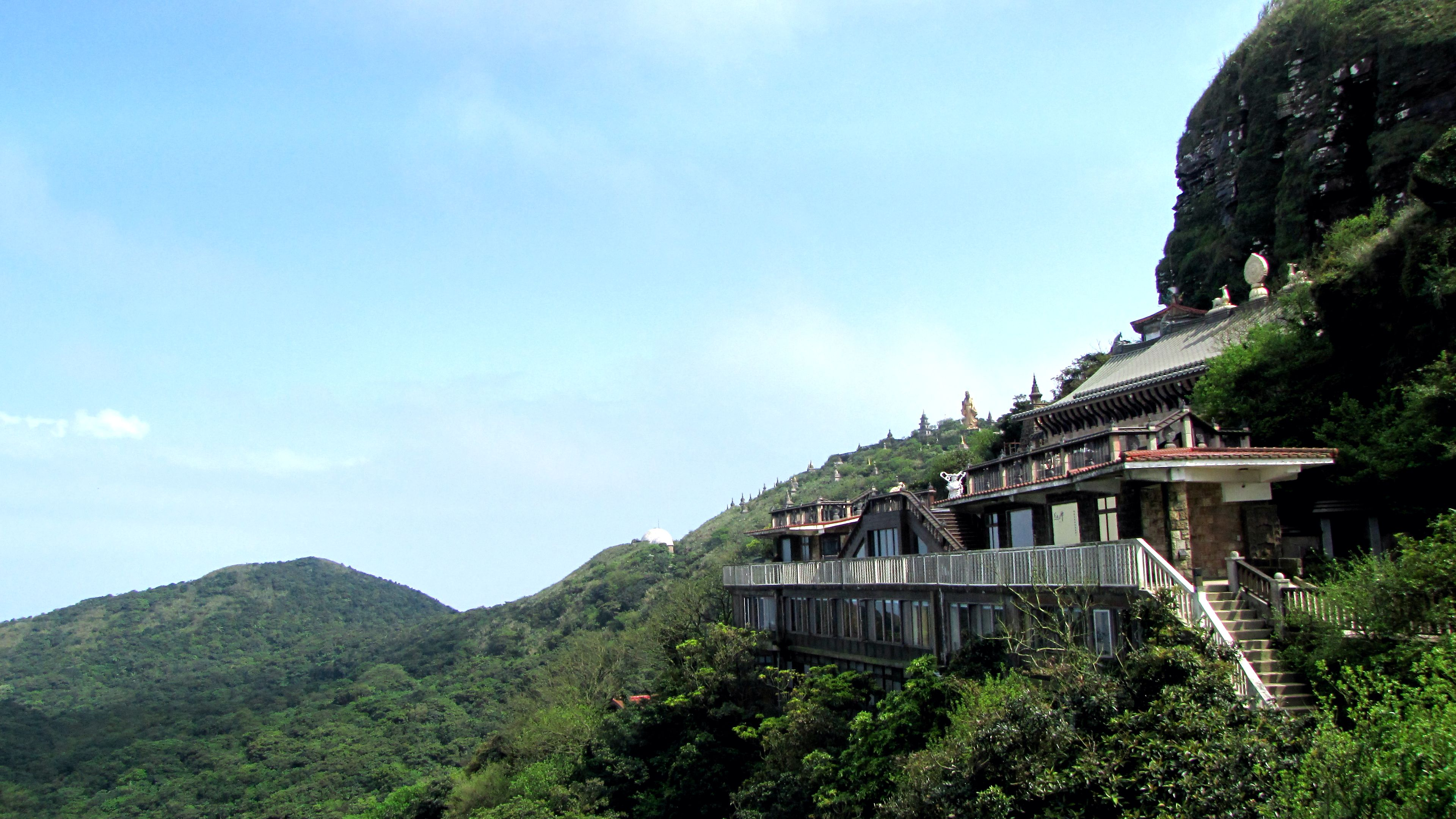 靈鷲山